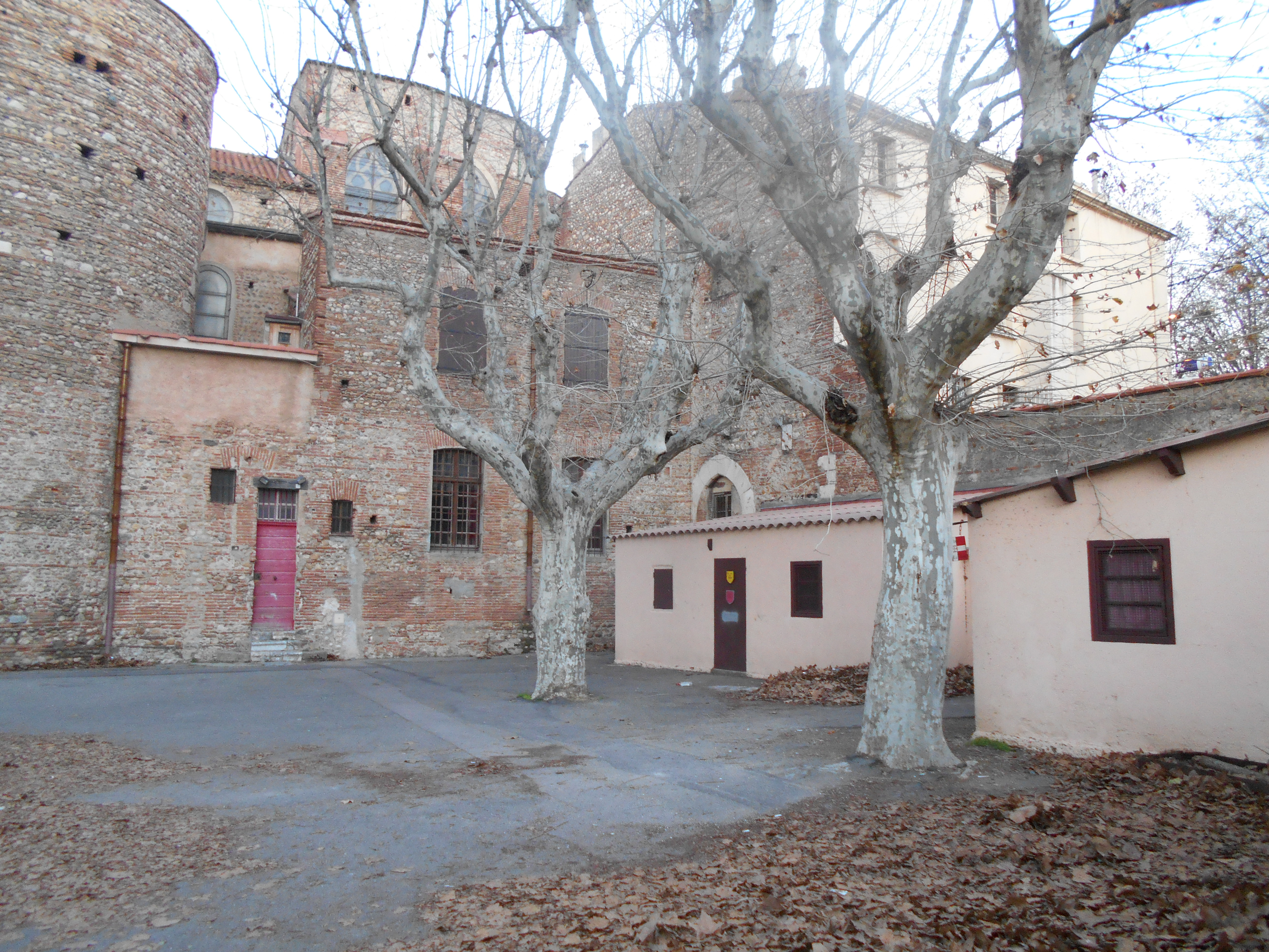 Capella de Sant Joan del Claustre, a Santa Maria la Real.